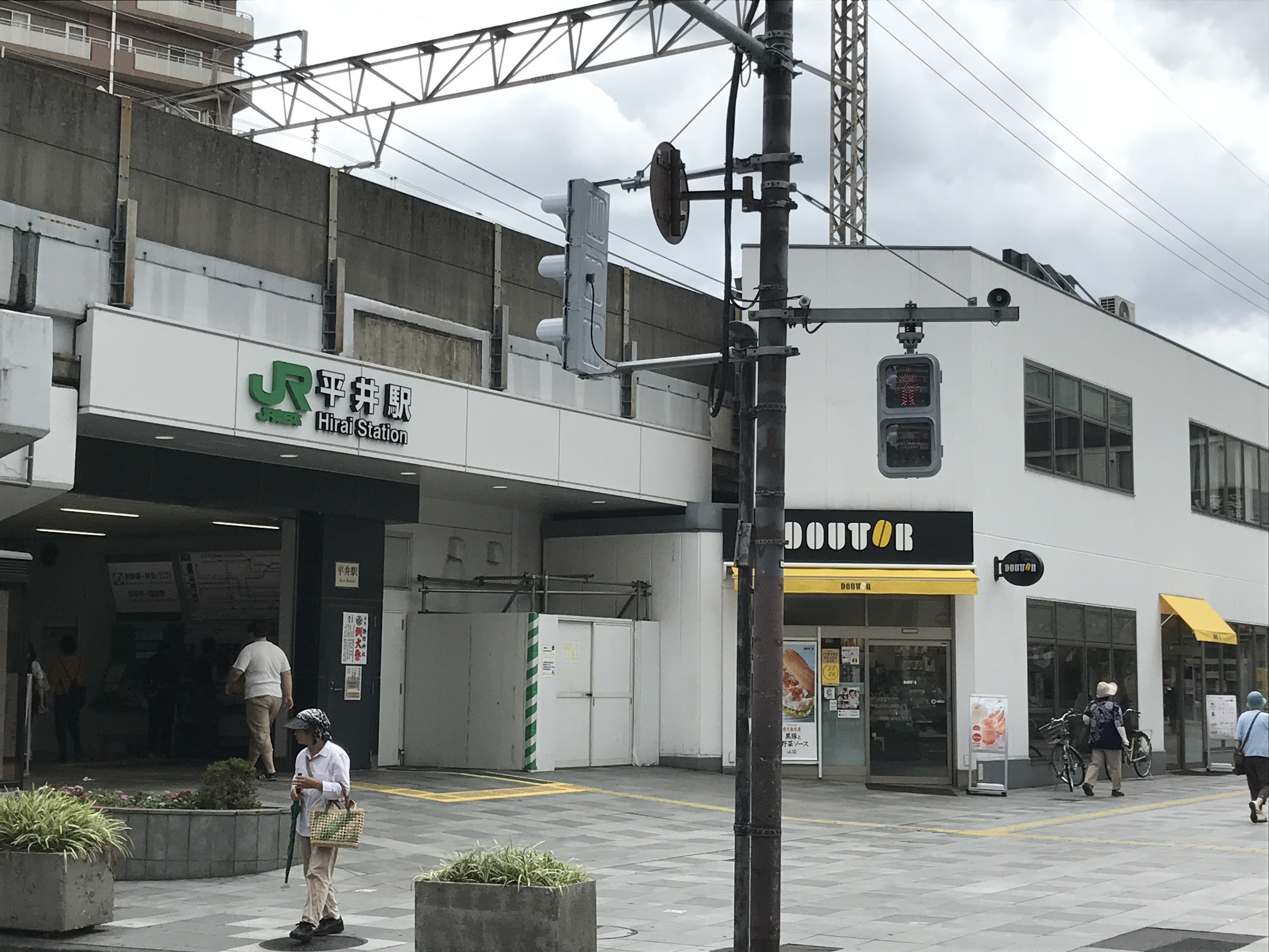 平井駅北口